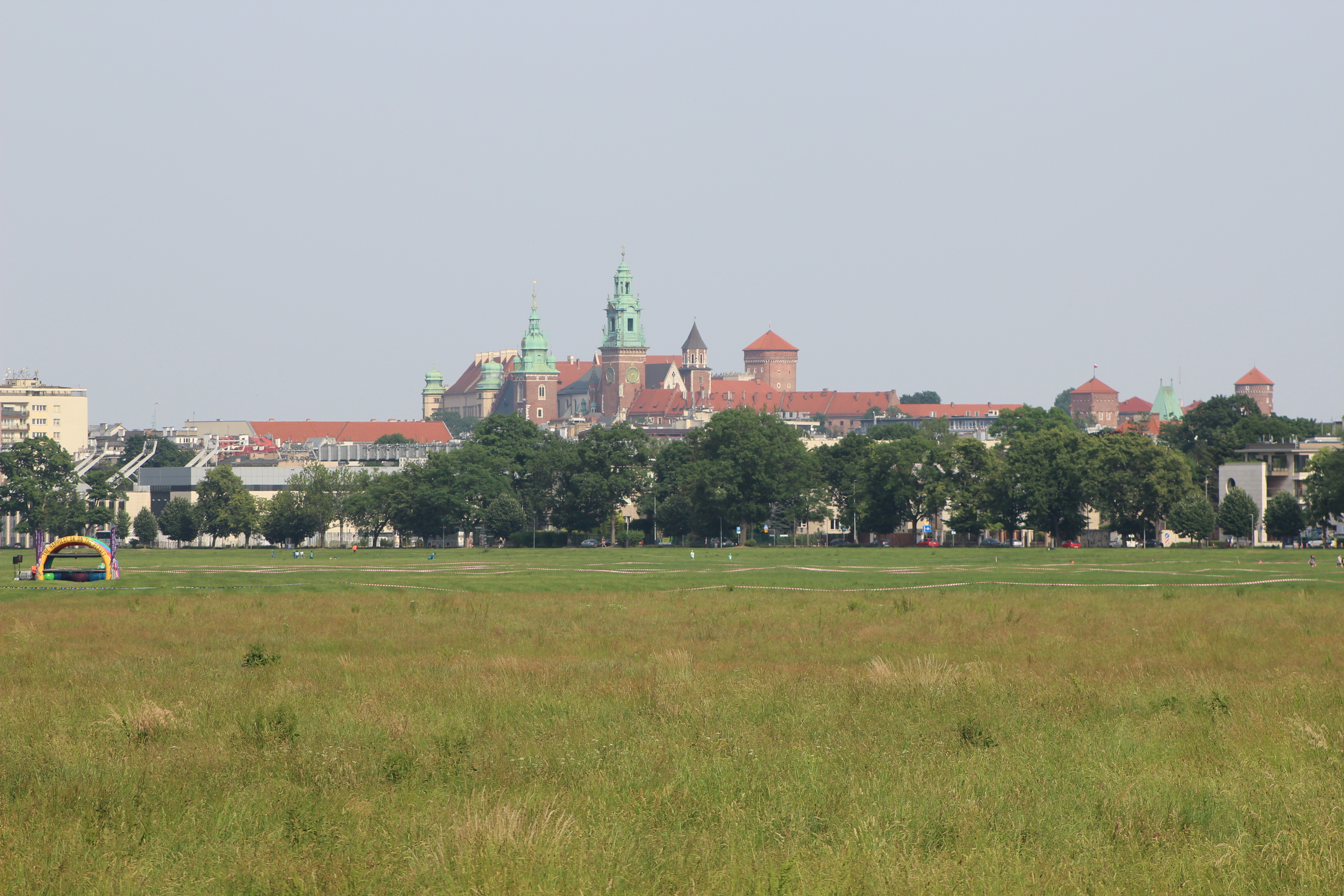 Błonia krakowskie, widok na Wawel od strony ul. Piastowskiej